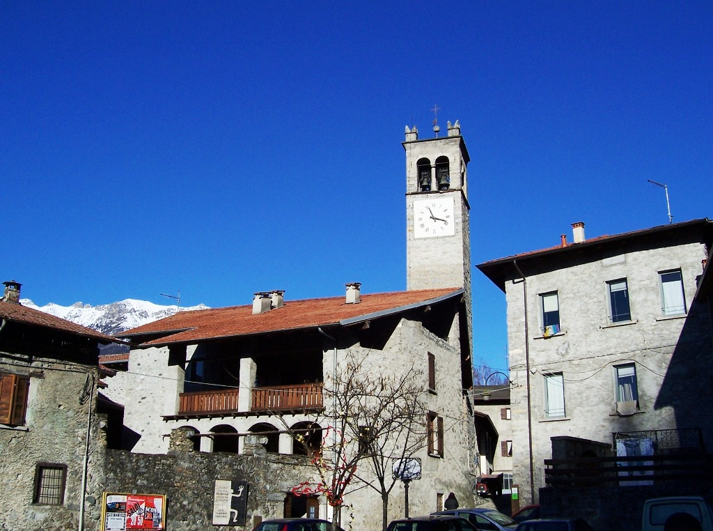 Nadro, Museo della Riserva , Val Camonica, Italia